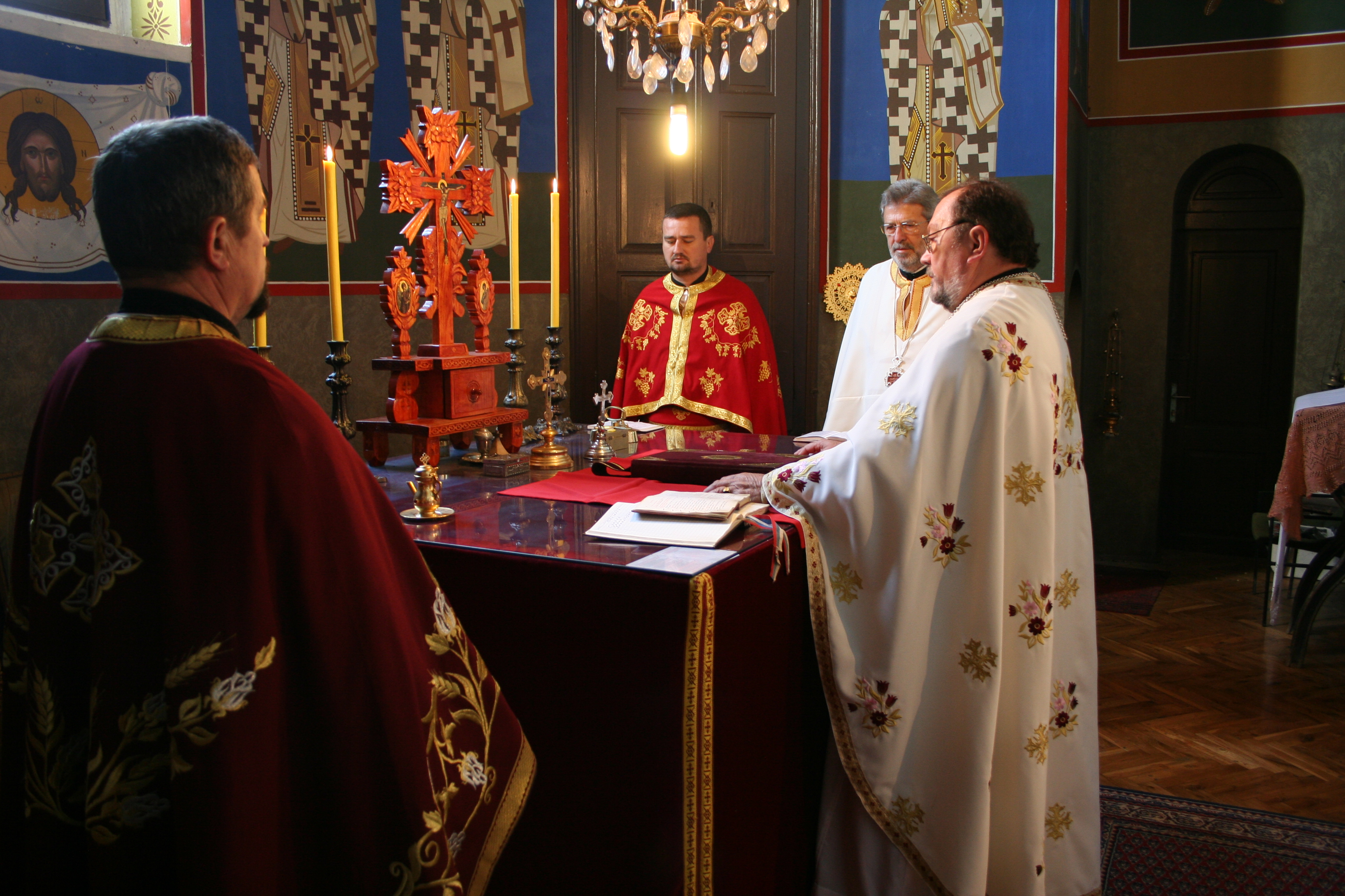 Proslava Sv. Luke, Jalovik